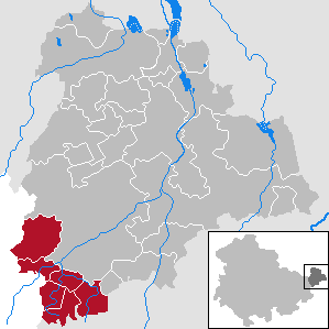 Verwaltungsgemeinschaft Oberes Sprottental in Thuringia - District Altenburger Land